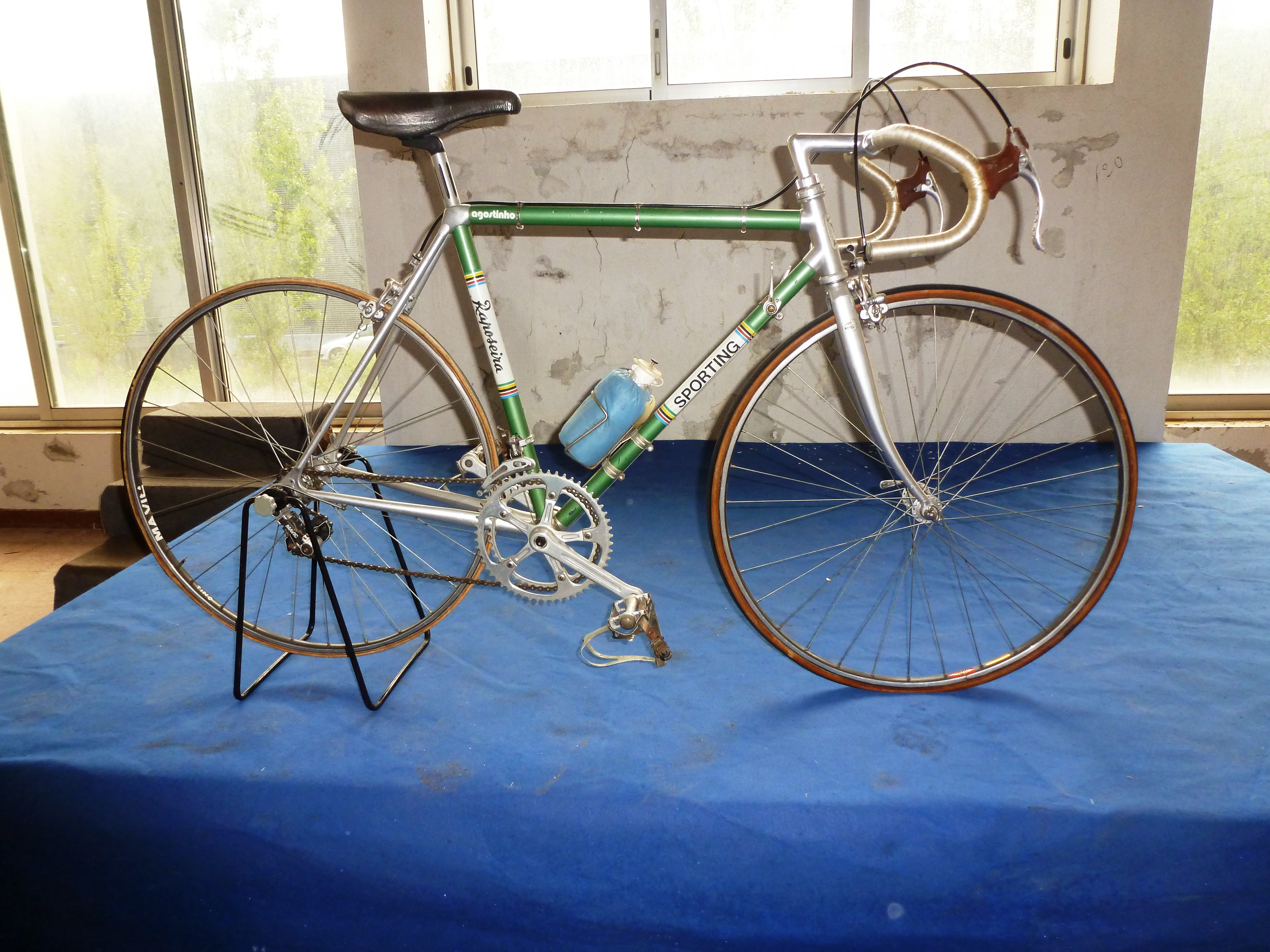 Last bicycle in the future museum for Joaquim Agostinho in Torres Vedras